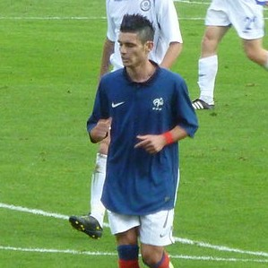 Jeremy avec l'équipe de France U21 (photo retaillée d'après la photo de Julien).